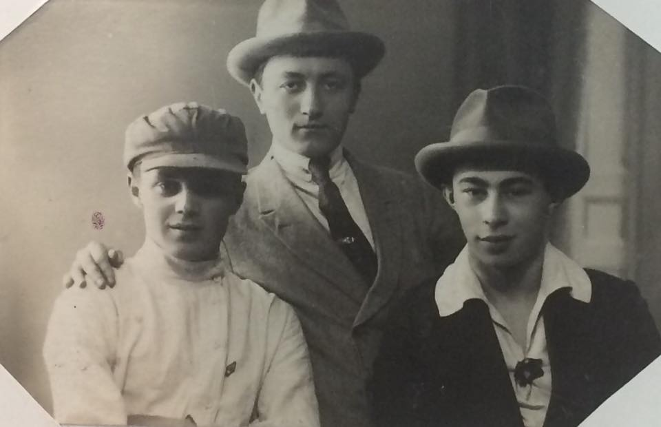 Міхась Багун, Змітрок Астапенка, Юлій Таўбін (Менск, 1930)